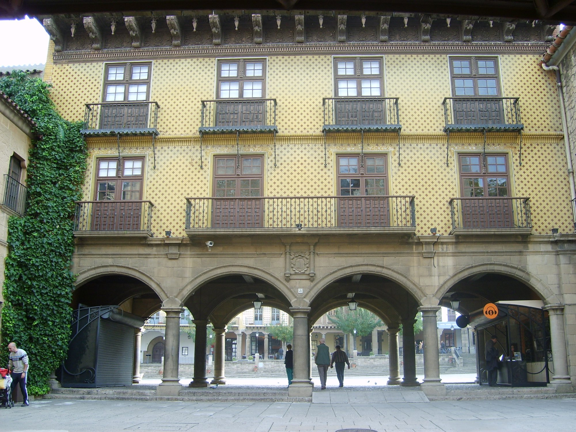 Interior del Poble Espanyol de Barcelona